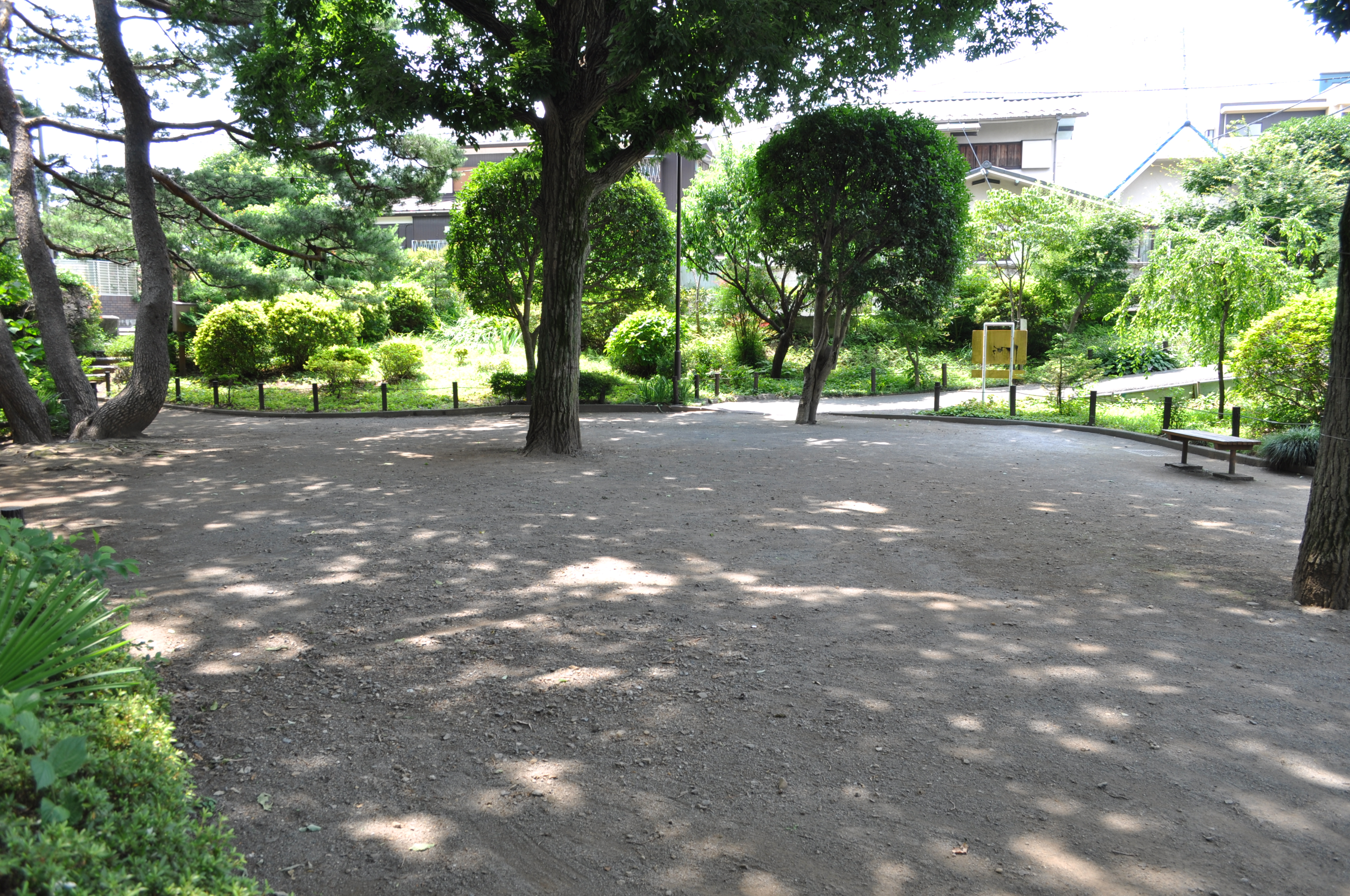 つつじヶ丘公園（らんせん池）